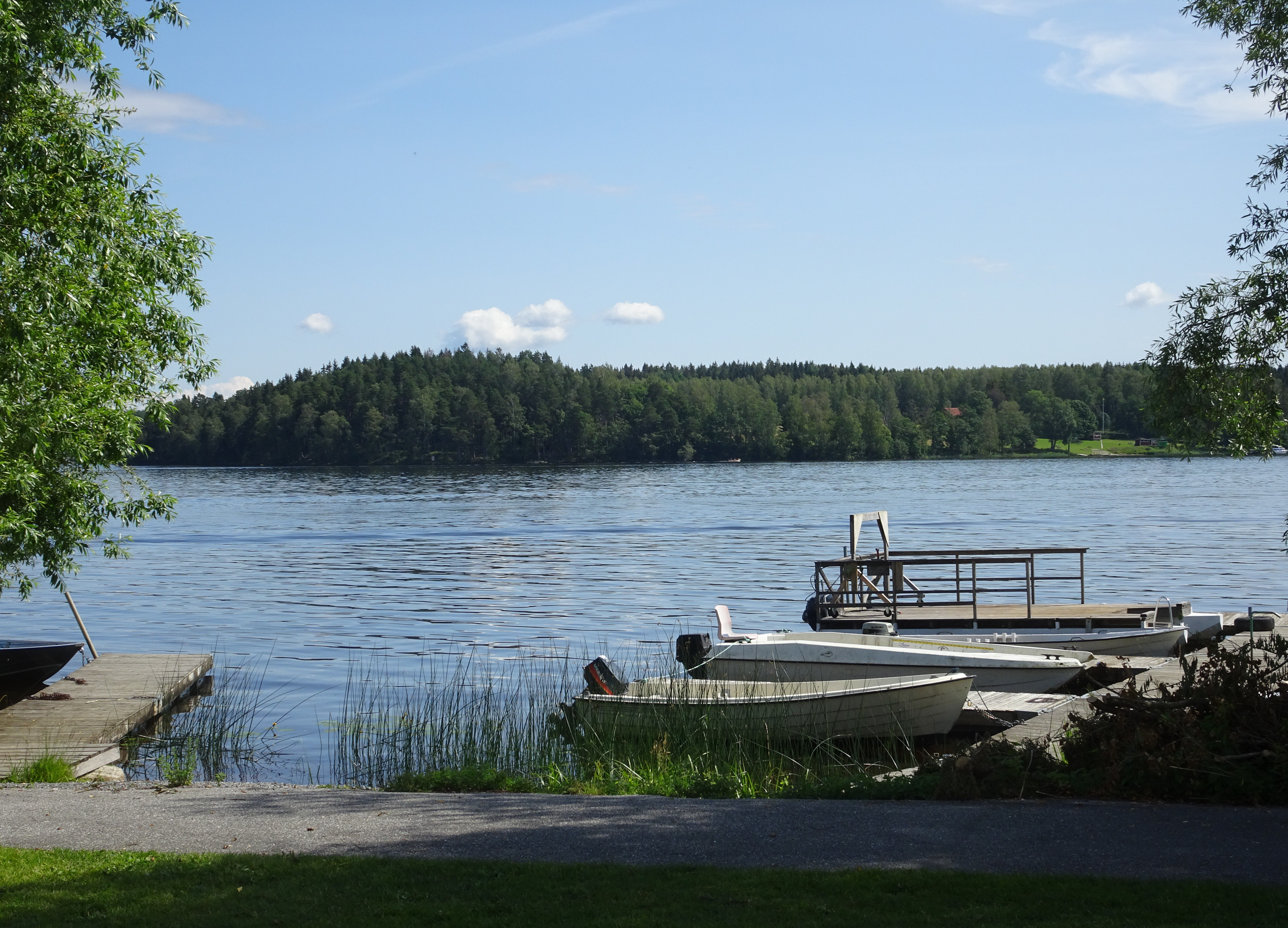 Norasjön